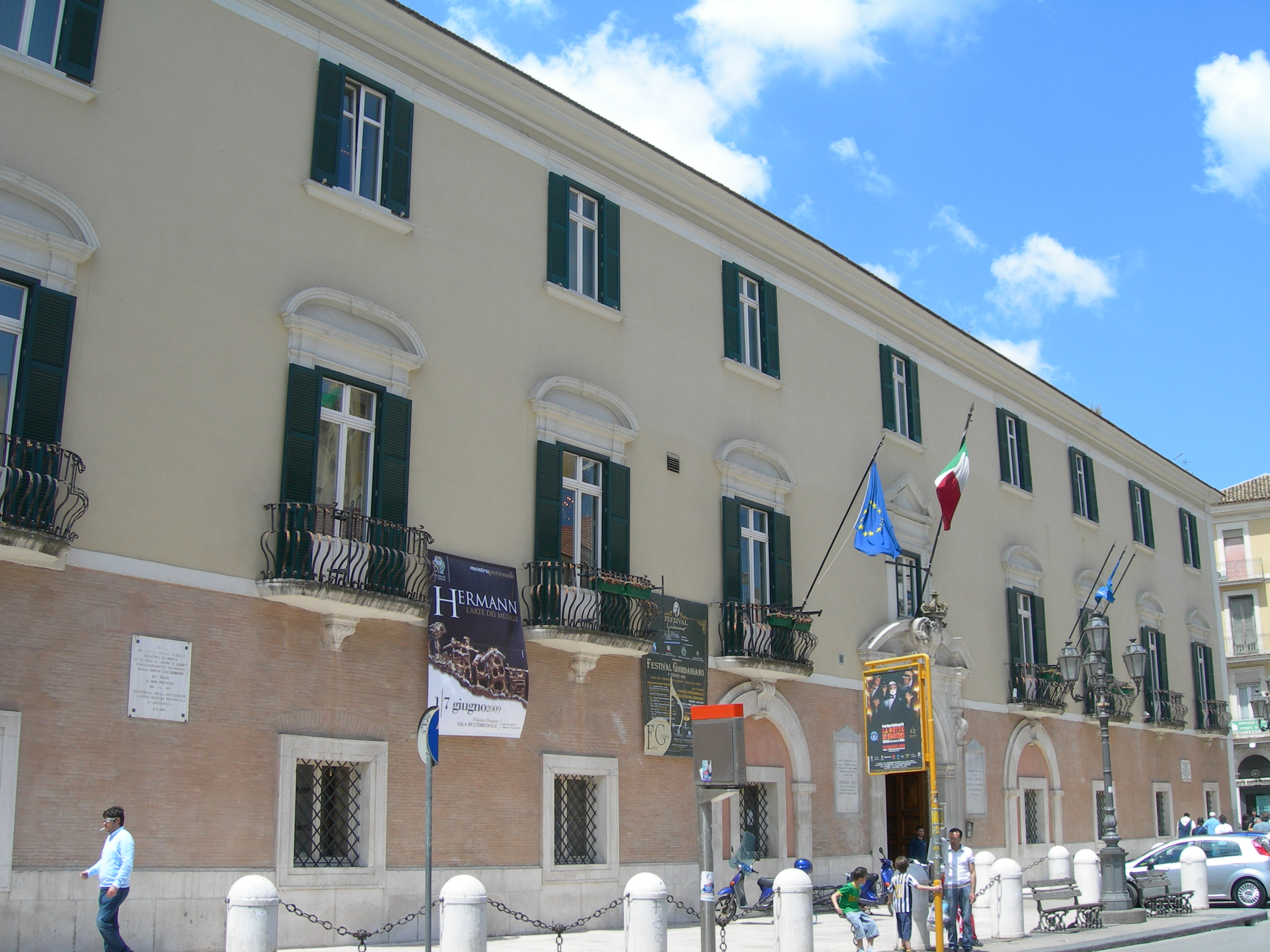 L'ex palazzo della provincia di Foggia, adesso dogana